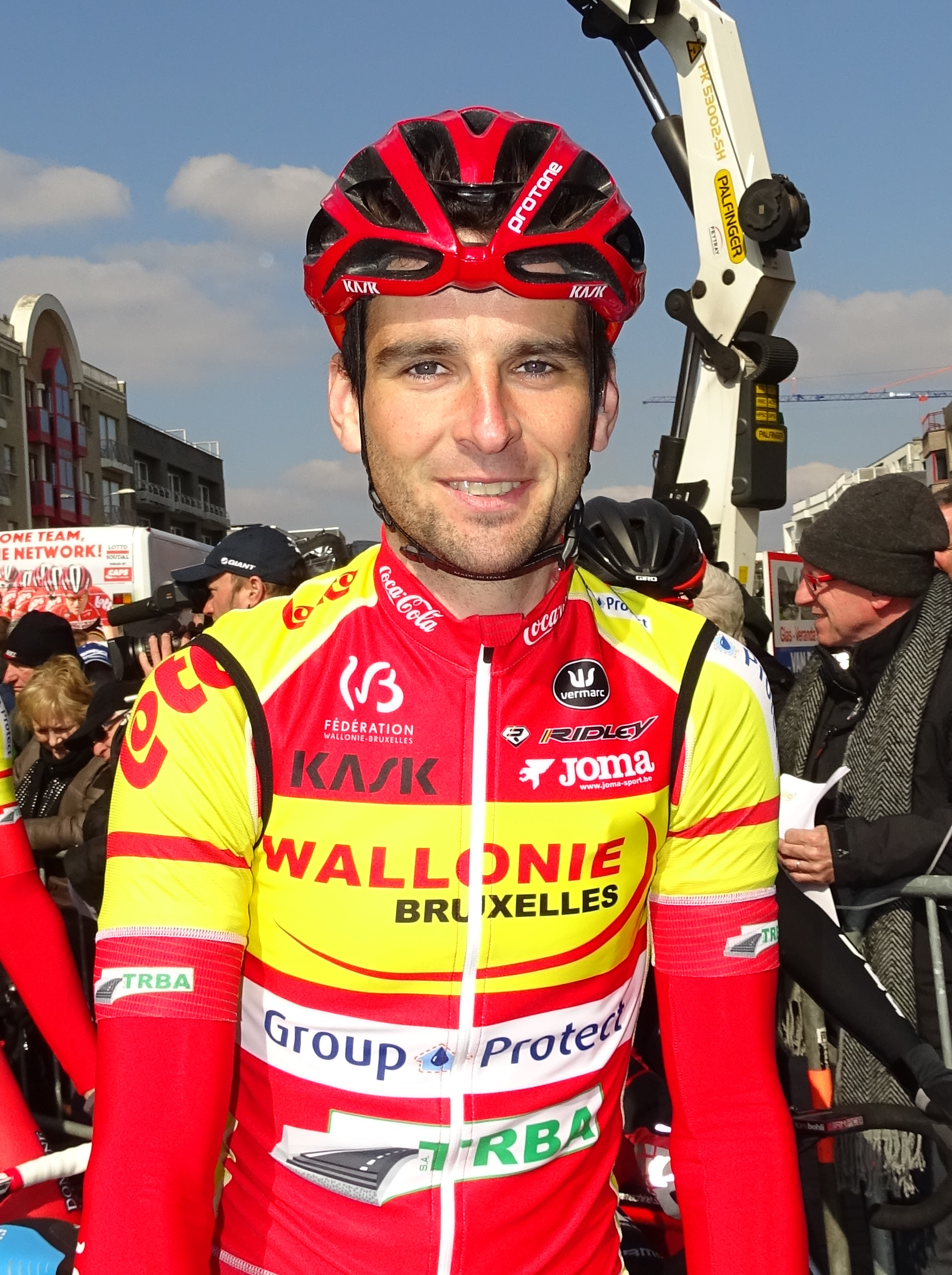 Reportage réalisé le mercredi 16 mars à l'occasion du départ de la Nokere Koerse 2016 à Deinze, Belgique.